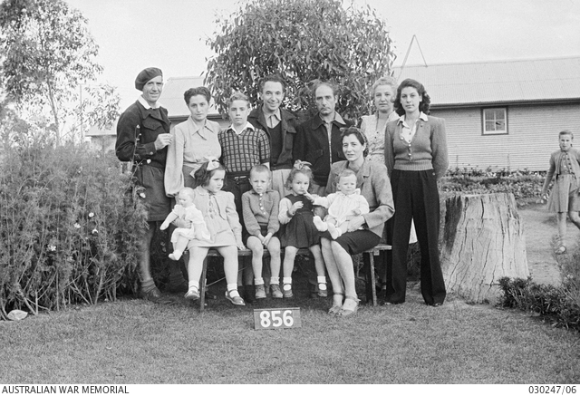 Marisa Martelli (rechts im Bild) mit ihren Eltern (links von ihr) und anderen Internierten im australischen Lager Tatura